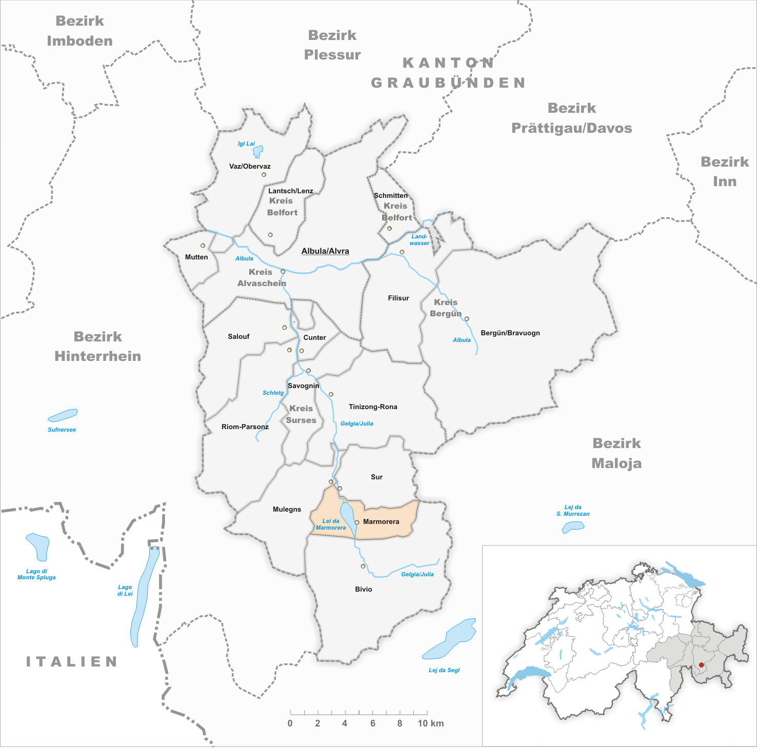 Municipality Marmorera